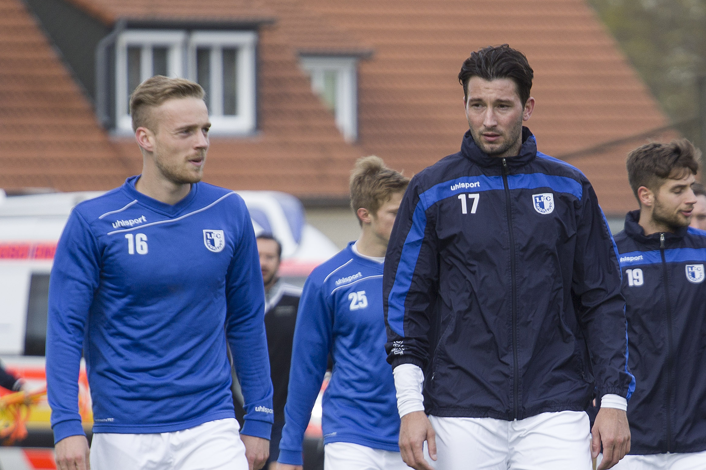 Nils Butzen und Marius Sowislo